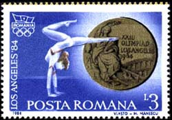 Romania 1984 stamp Ecaterina Szabo